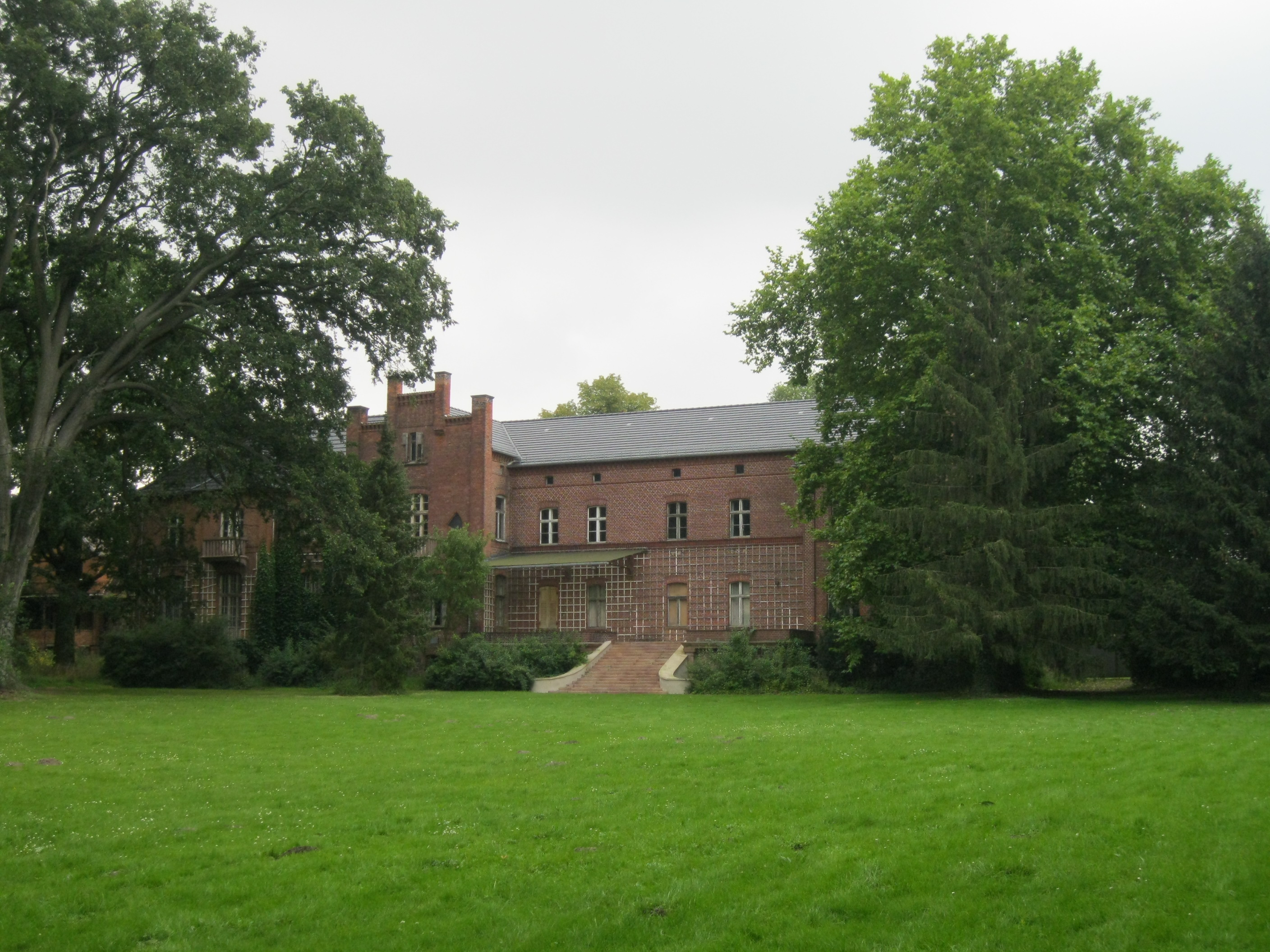 Schloss Wittenmoor/Altmark in der Nähe von Stendal